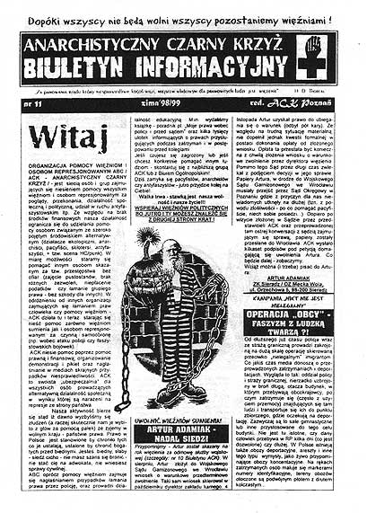 Biuletyn Anarchistycznego Czarnego Krzyża/Anarchist Black Cross Biulettin from Poland